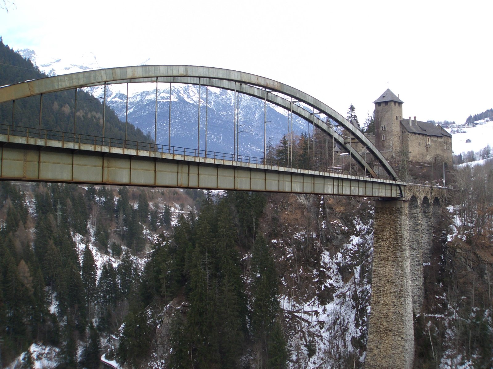 de: Trisannabrücke mit Schloss Wiesberg. en: Trisannabridge with Castle Wiesberg.